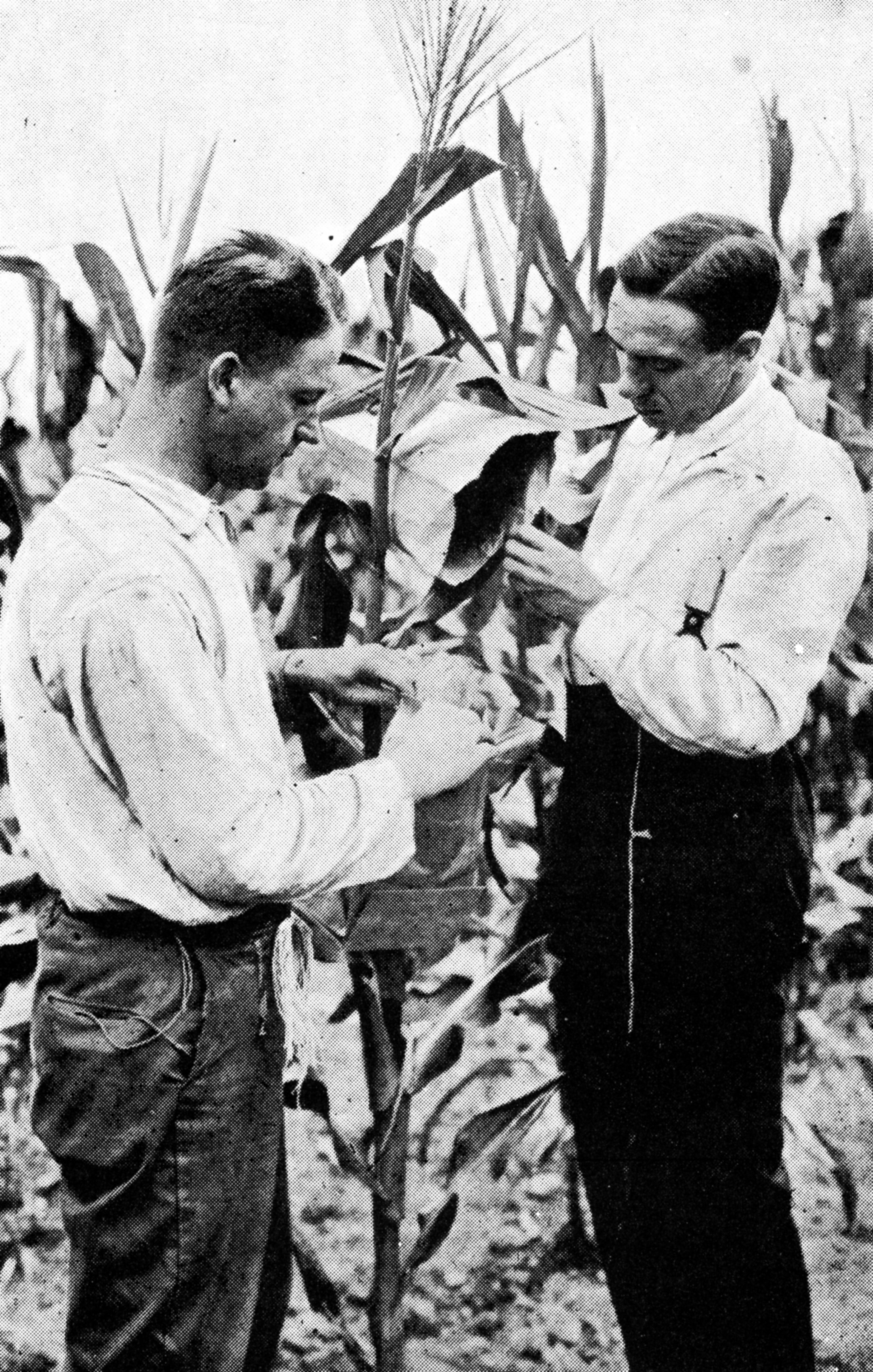 Cruz Gallastegi Conneticut-en, Jones-ekin batera